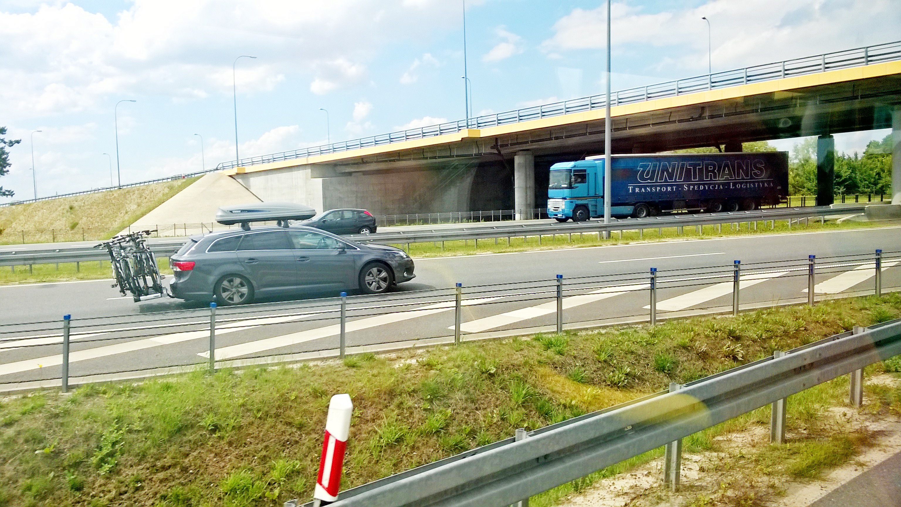 Autostrada A1 w okolicy Torunia